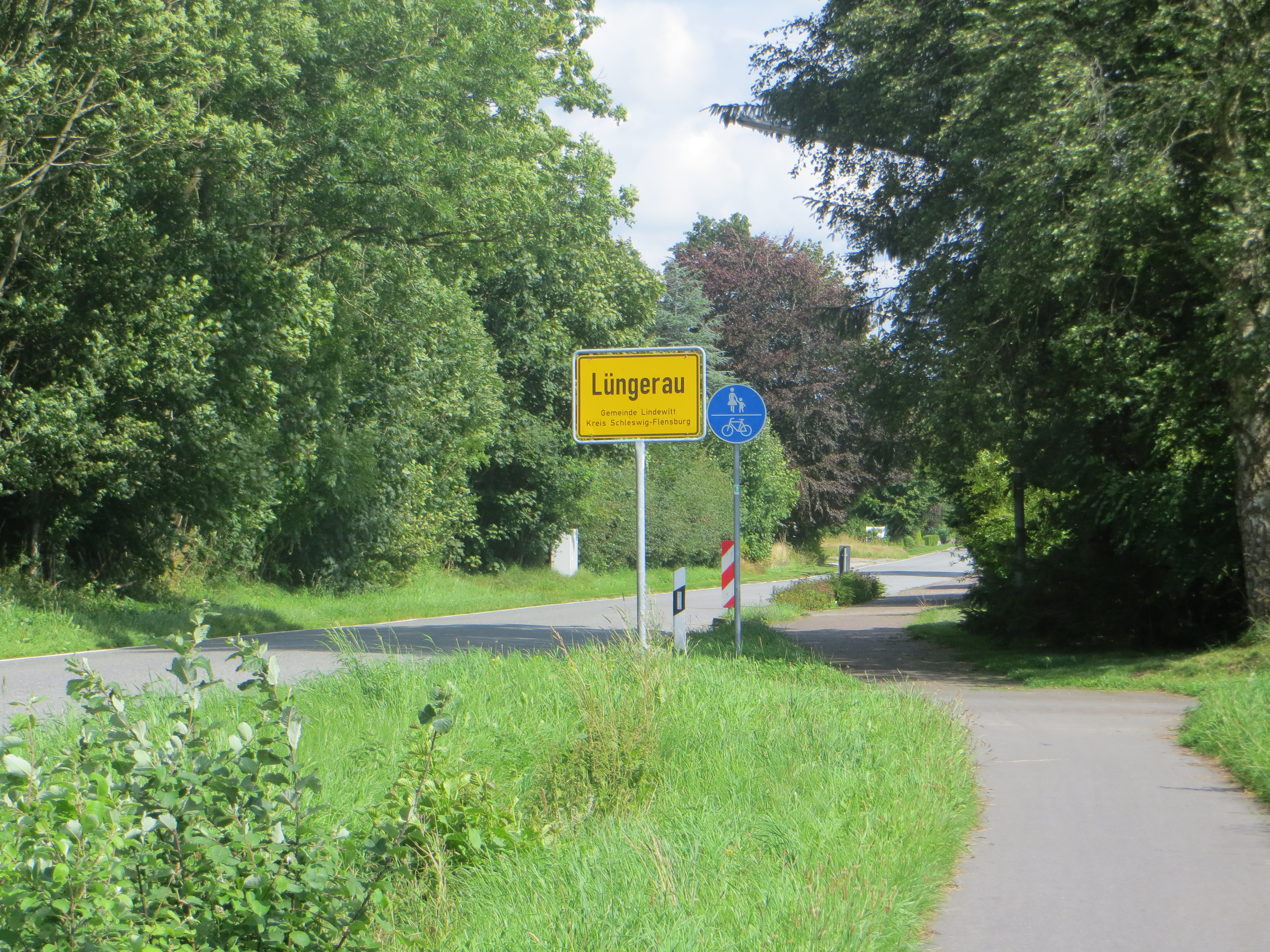 Lüngerau Hauptstraße Ausfahrt nach Kleinwiehe